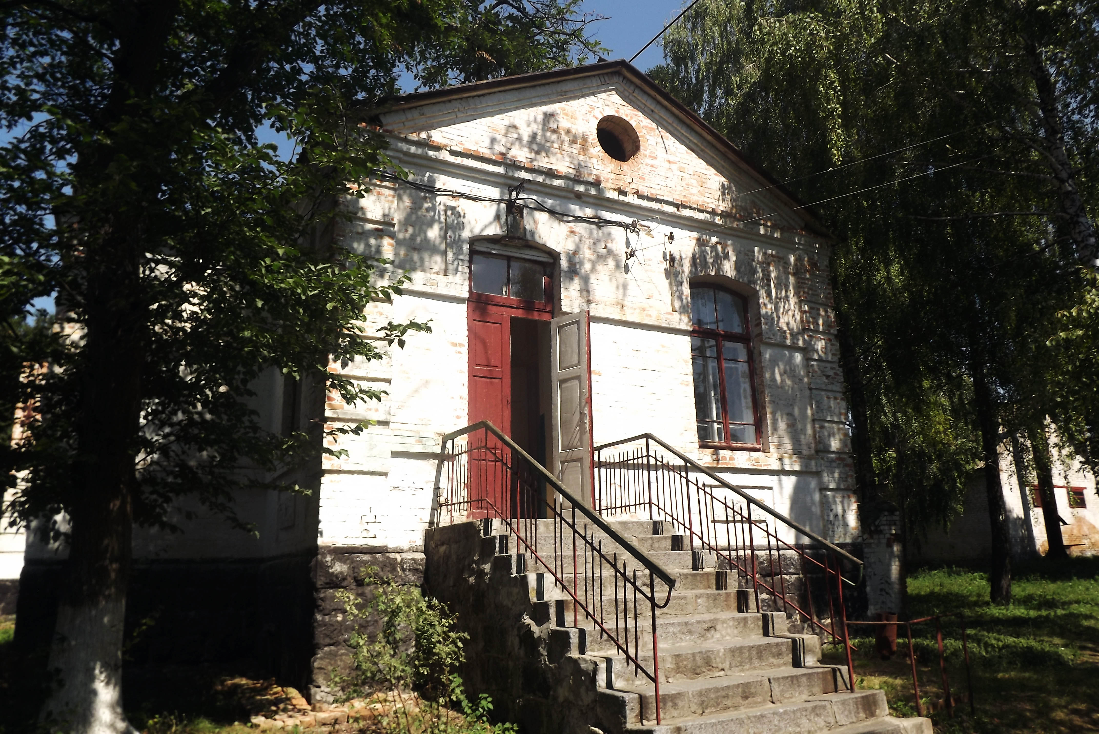 Капітанівська дільнична лікарня (Капітанівка, Новомиргородський район, Кіровоградська область)